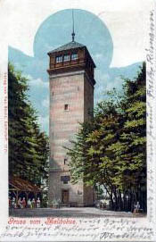 Der Melibokusturm auf dem Melibokus auf einer Postkarte aus dem Jahr 1902